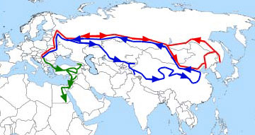 Klub putnika - primer tri putovanja